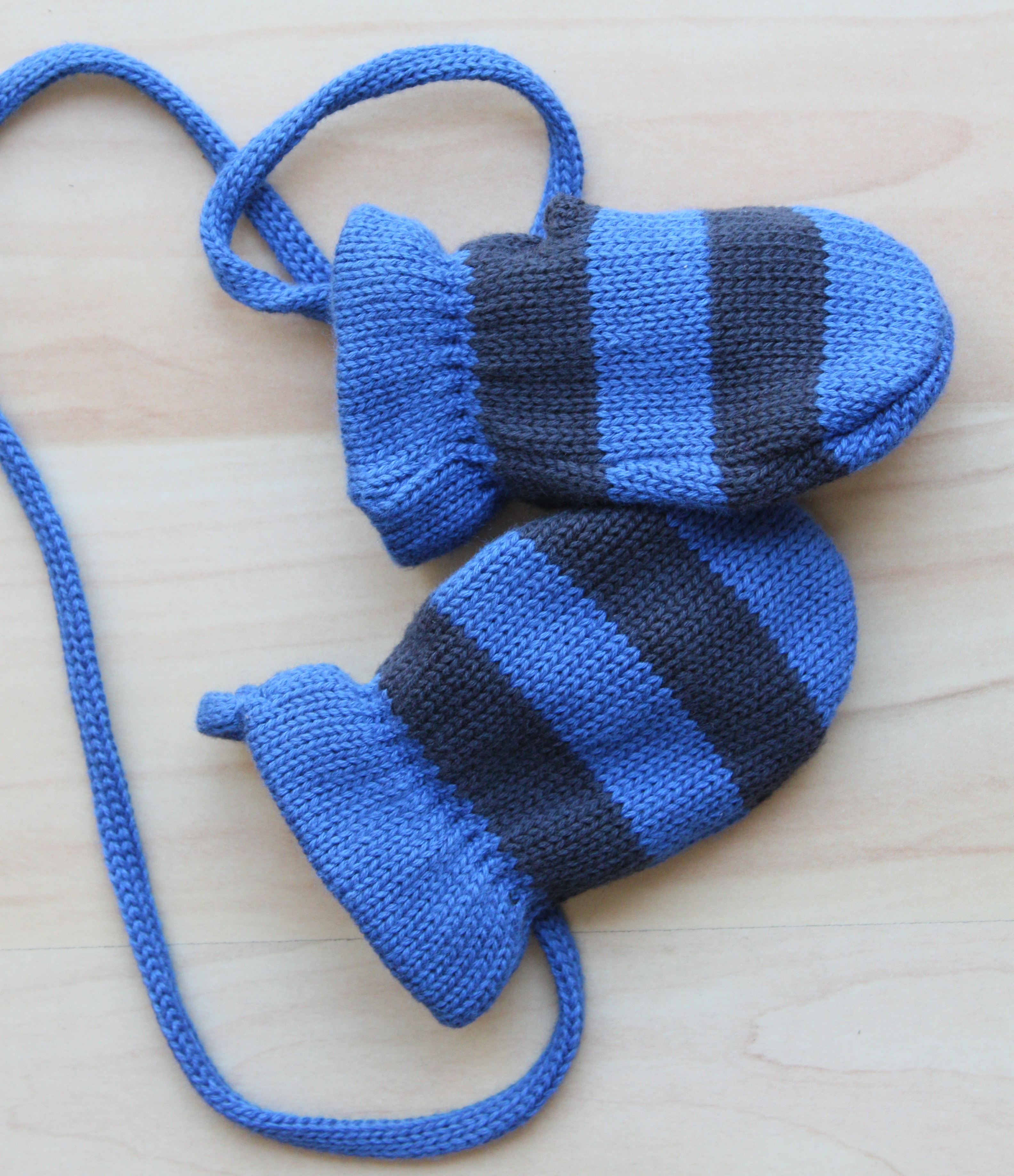 Babyhandschuhe